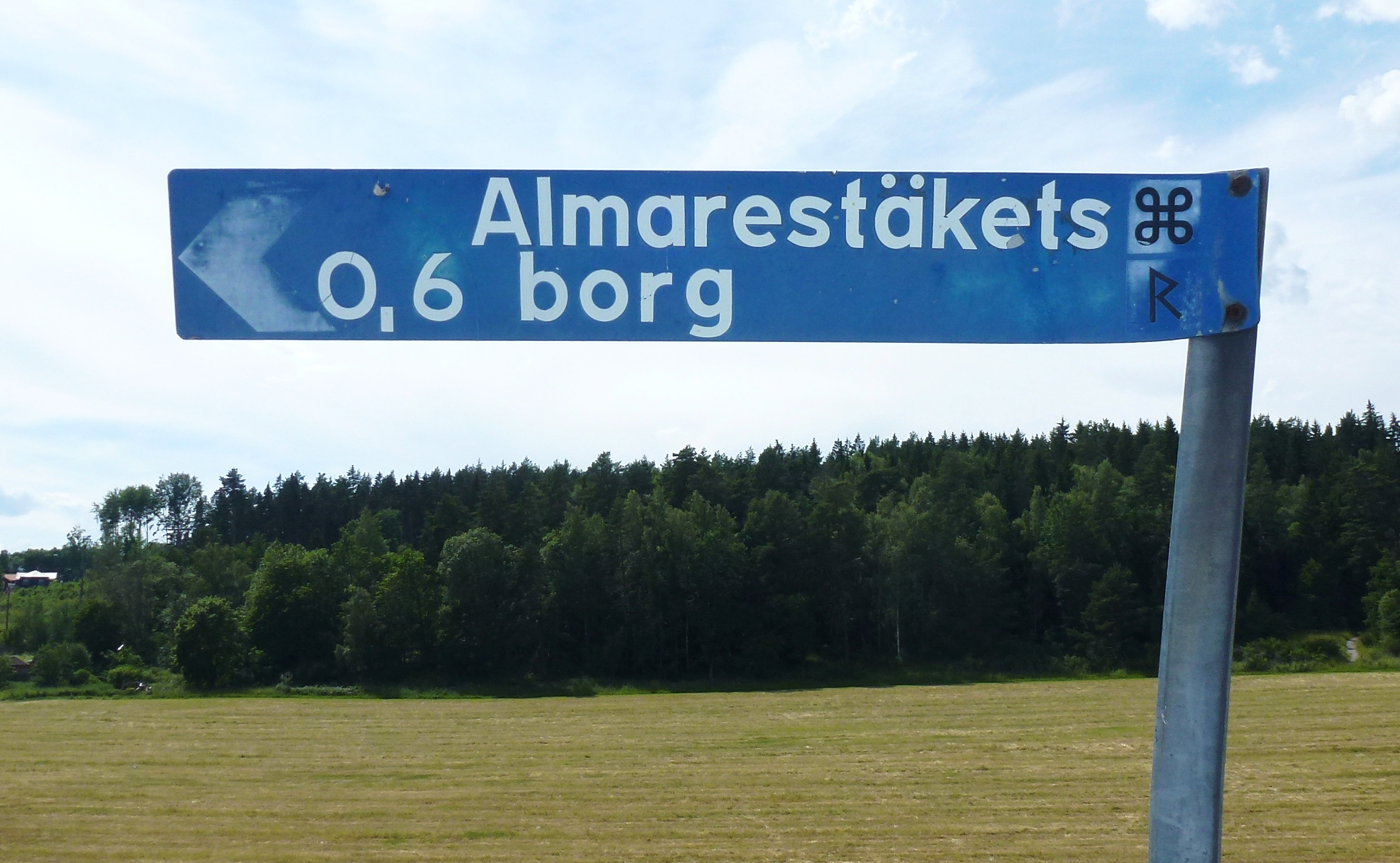 Skylt till Almarestäkets borg på Stäksön